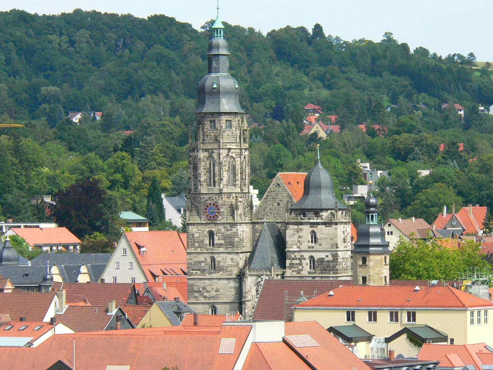 Moritzkirche in Coburg Fotograf: presse03, selbst fotografiert, 2003 Lizenz: GNU-FDL Kategorie:Bild:Kirche